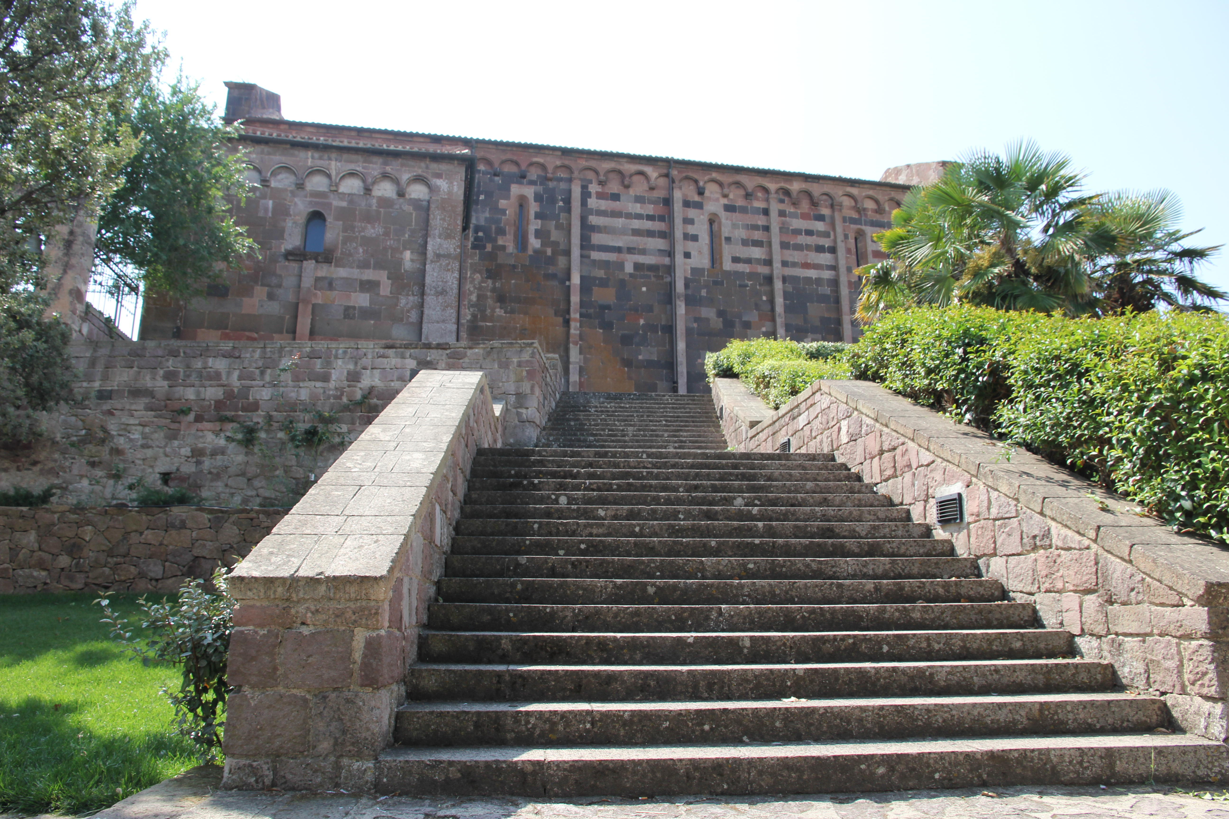 Ottana - Chiesa di San Nicola